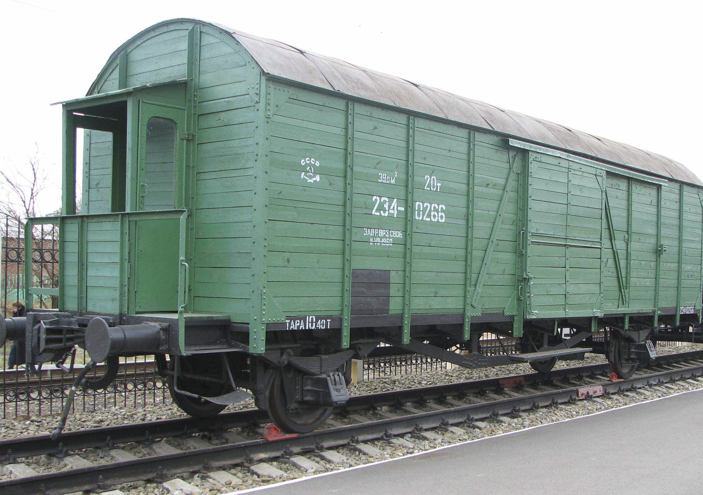 Вагон построен в 1930-х годах в Германии. Трофей Великой Отечественной войны